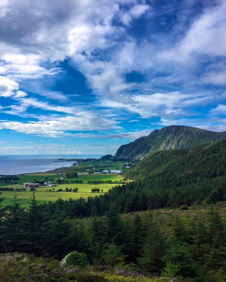 Haram på Haramsøy